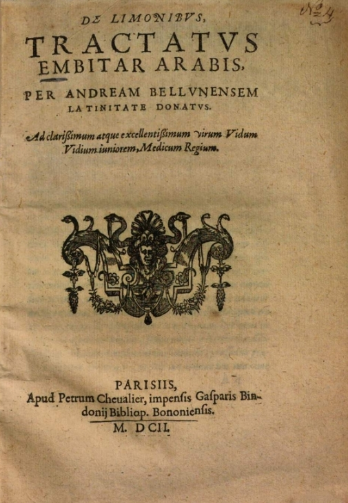 Ebenbitar (Ibn al-Baitar), transl. Andreas Alpagus, Tractatus de limonibus (1602) title page